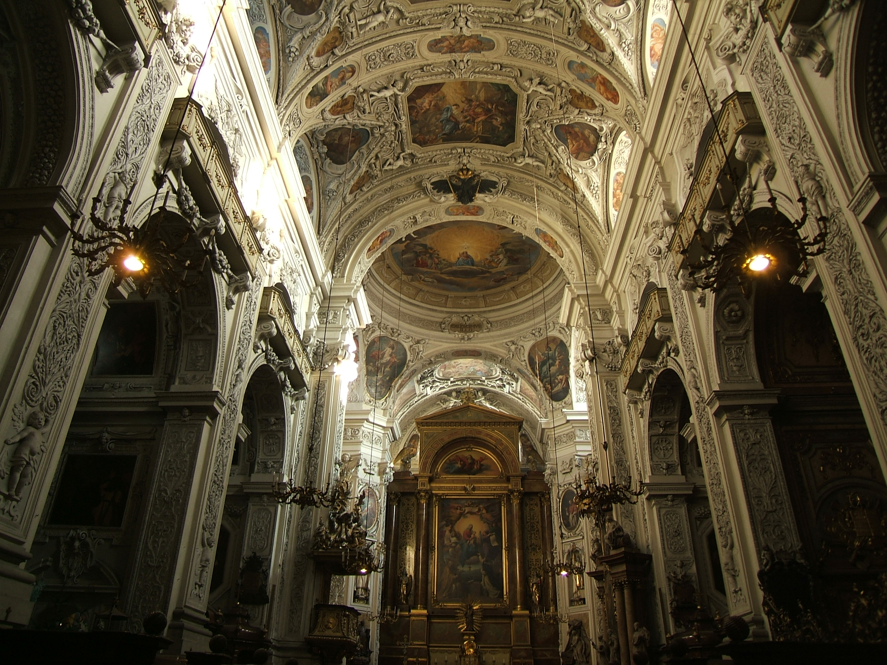 Dominikanerkirche Sancta Maria Rotunda mit Dominikanerkonvent